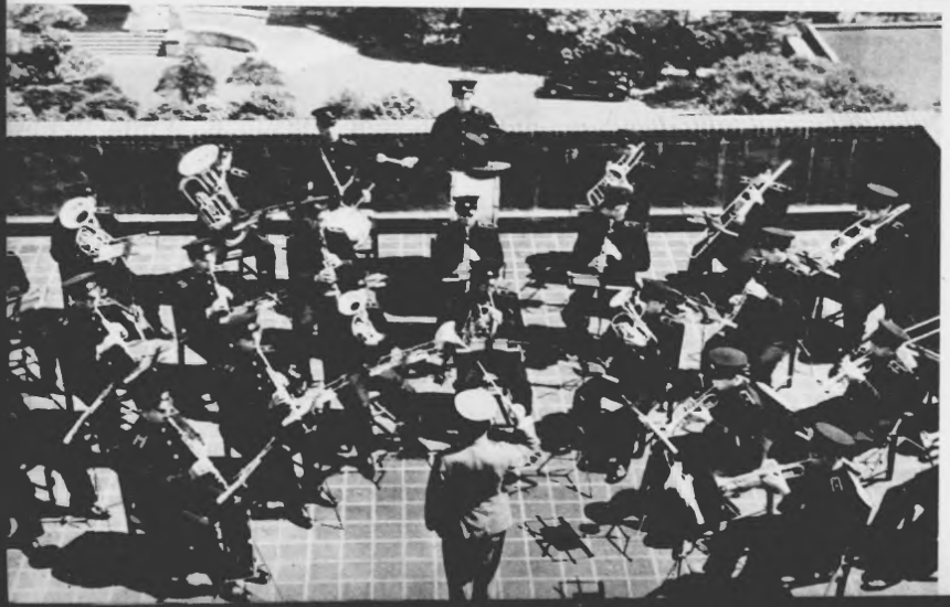 警視庁音楽隊。1938年（昭和13年）。